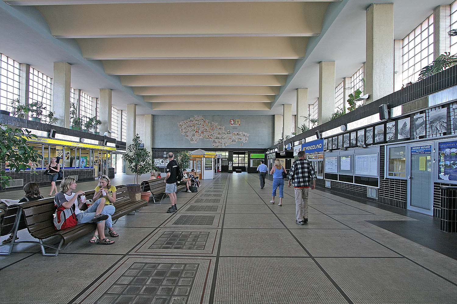 Hala hlavního nádraží v Pardubicích